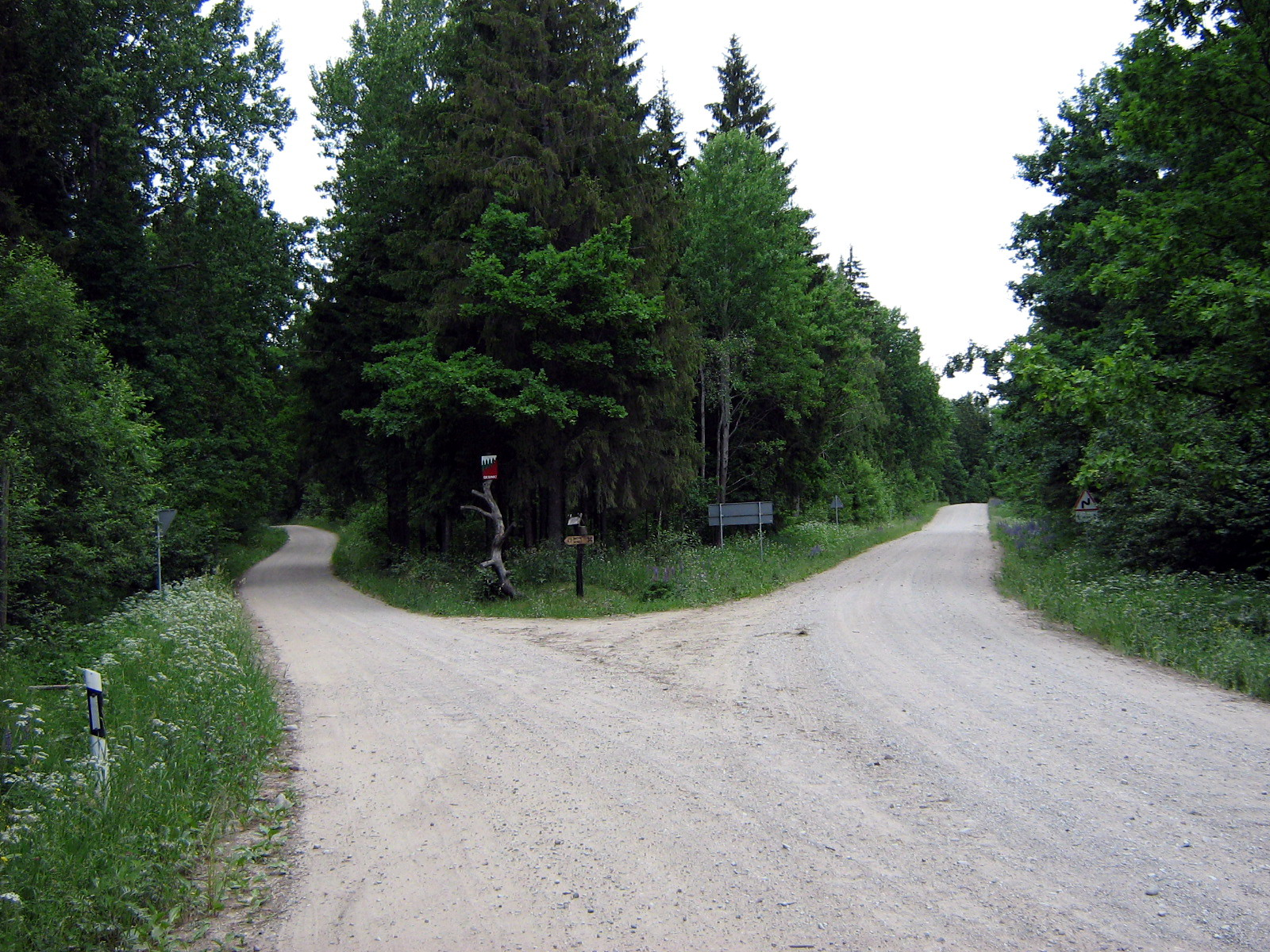 Užpelkių telmologinis draustinis, Plungės rajonas, Žemaitijos nacionalinio parko teritorija Foto: Algirdas, 2007 m. birželio 15 d., Lietuva